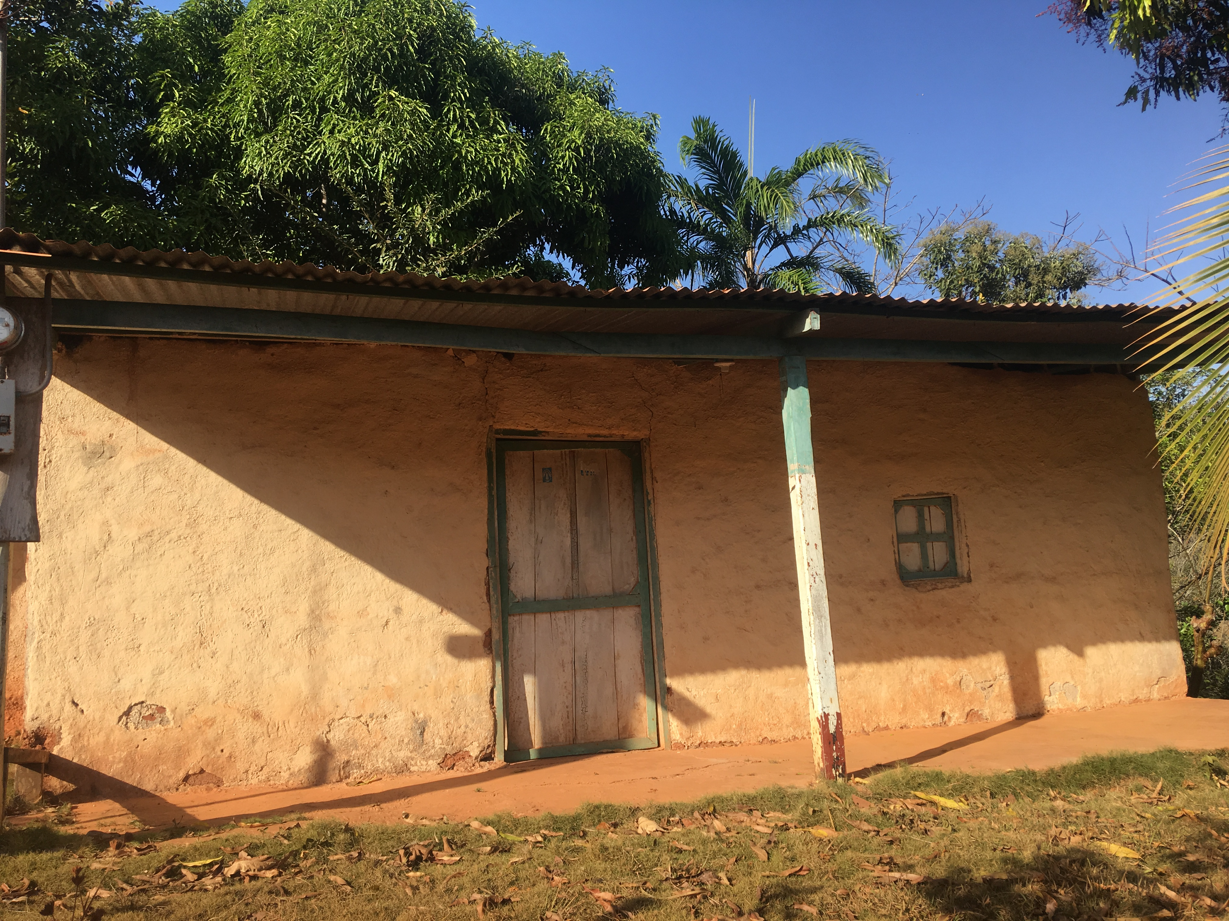 Esta es una de las casas mas representativas del lugar. Han trascurrido años de la construcción de la misma, y es la que representa las casas de quincha, las cuales eran muy comunes en el lugar